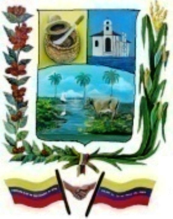 Escudo del Municipio Juan Manuel Cajigal (Anzoátegui)